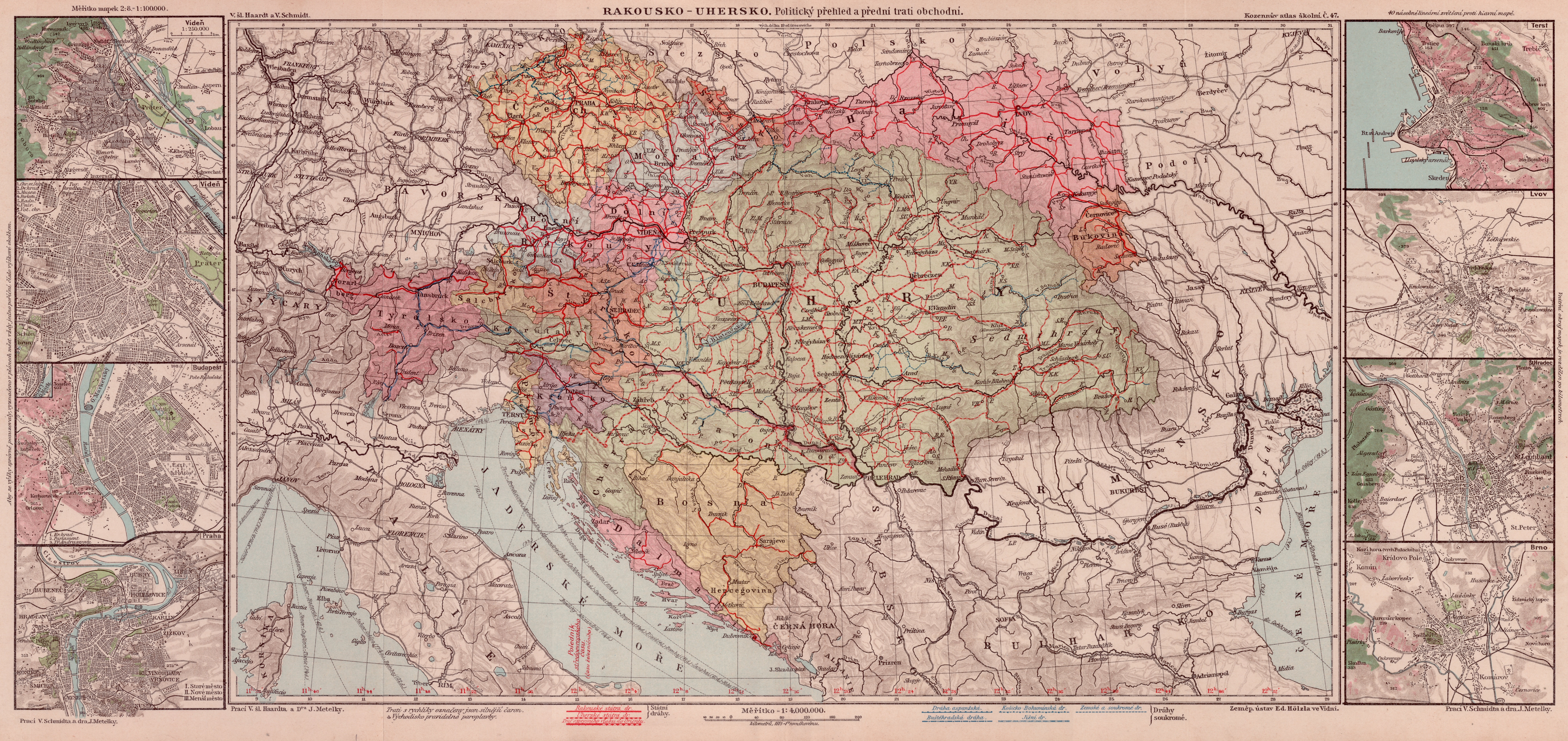 Mapa č. 47, Rakousko-Uhersko. Politický přehled a přední trati obchodní. Blažeje Kozenna zeměpisný atlas pro střední školy (gymnasia, reálky, ústavy učitelské, školy průmyslové a obchodní). Zcela nově zpracovali V. šl. Haardt a V. Schmidt. Pro české školy upravil Dr. Jindř. Metelka. 15. vydání. Ve Vídni. Ed. Hölzel, 1914